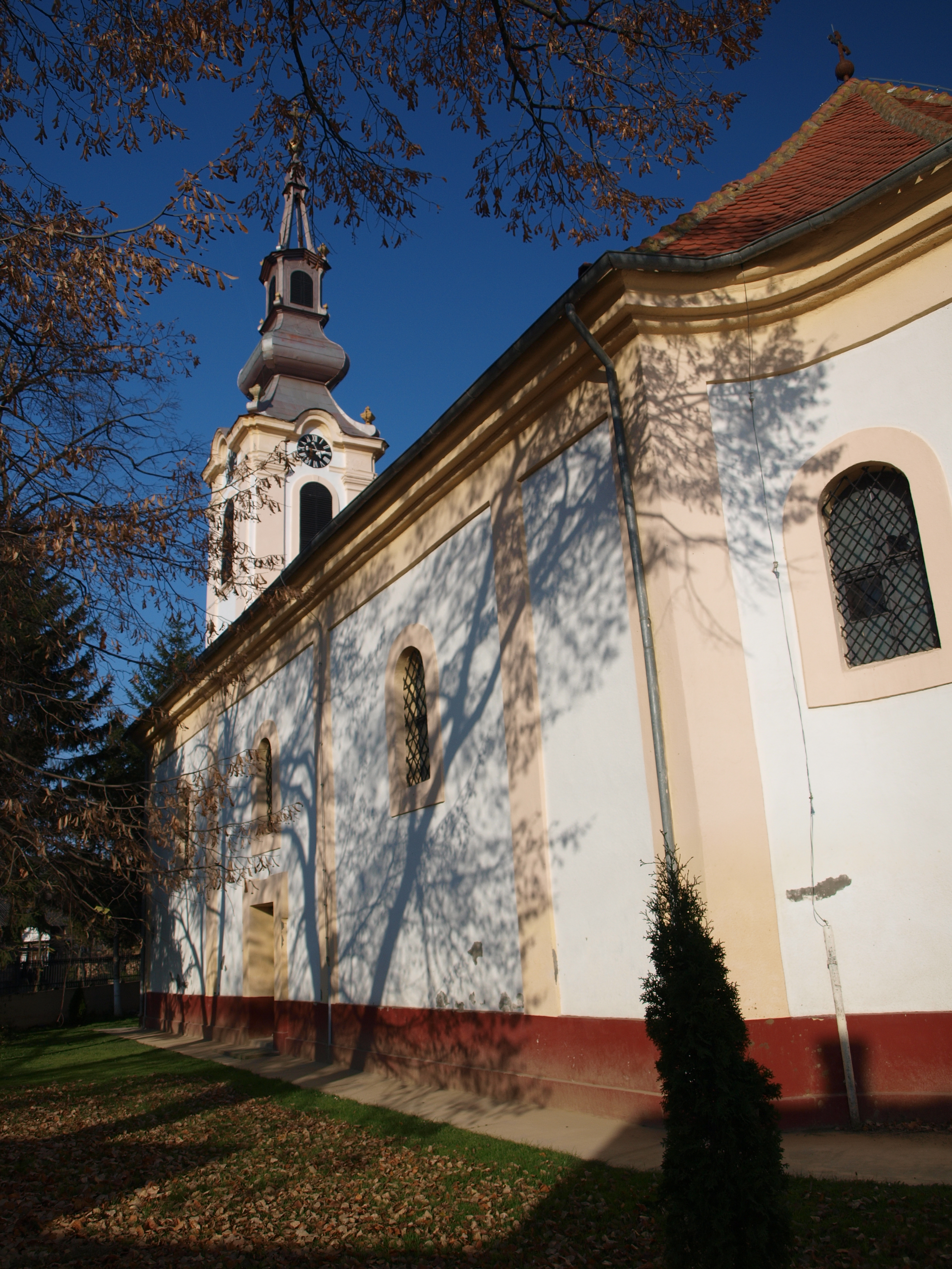 Crkva u Suseku, Srbija.